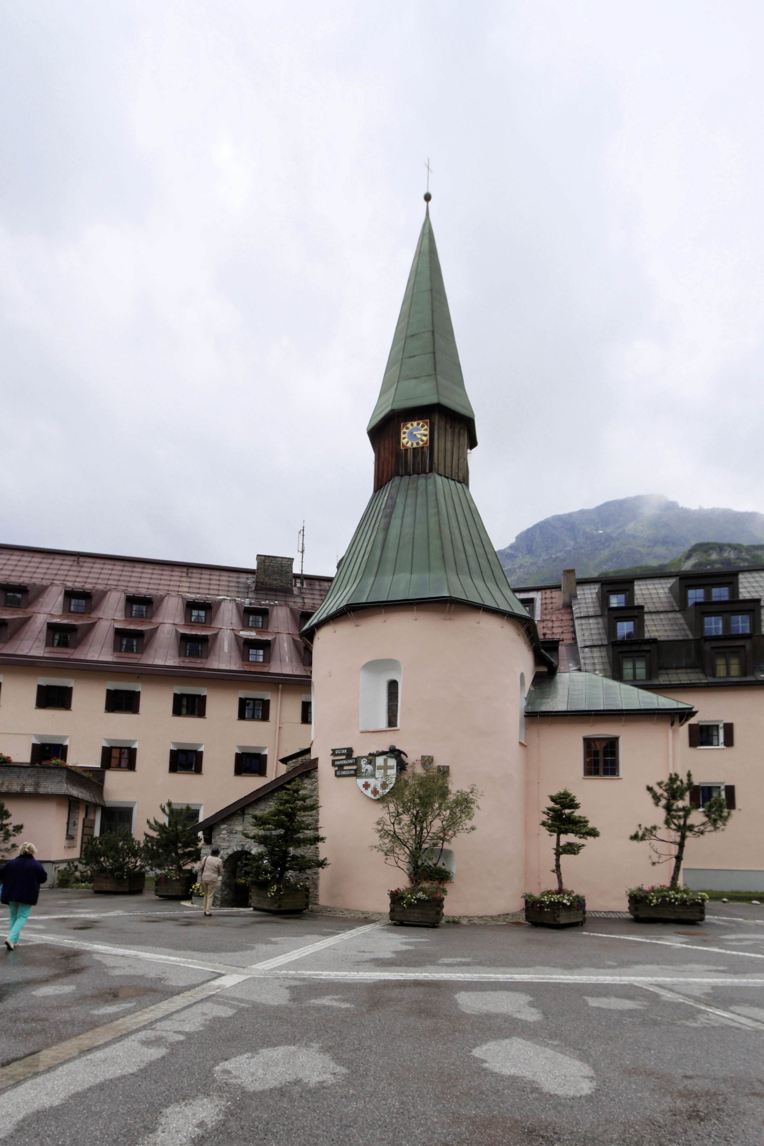 Bruderschaftskapelle Arlberg-Hospitz, Tirol